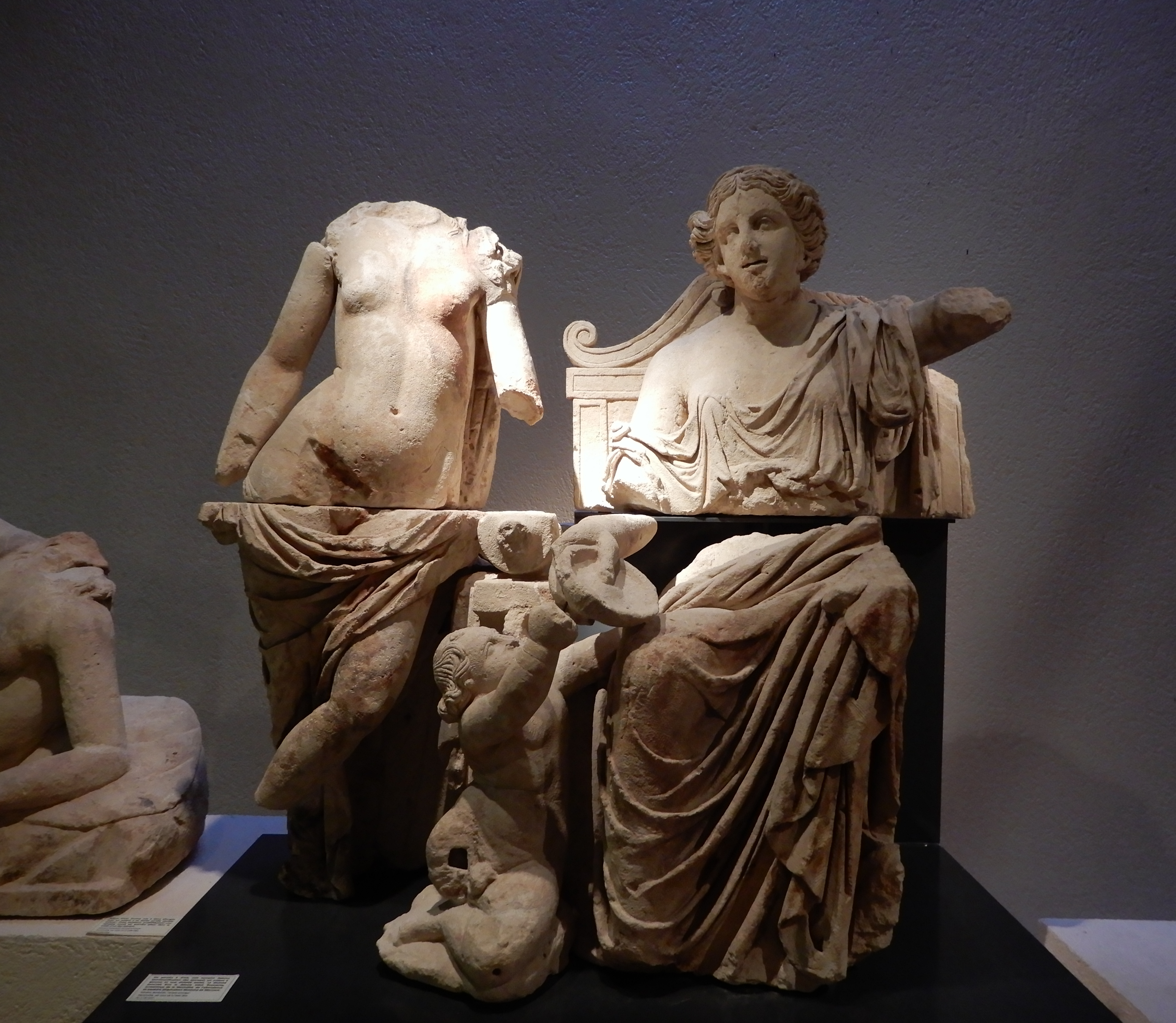 Nymphe debout, enfant et divinité assise. Temple principal du site de Genainville.